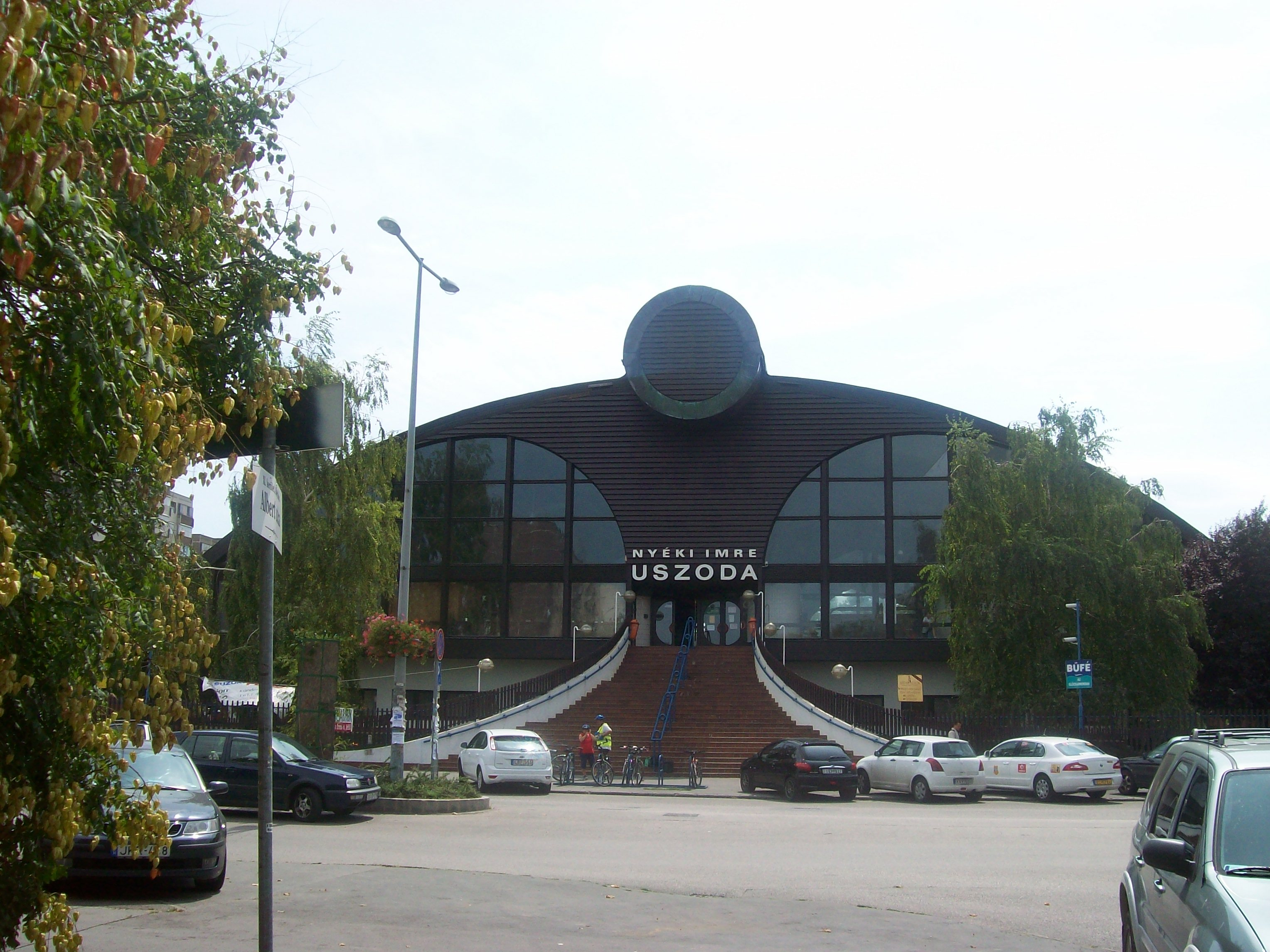 Az albertfalvi Nyéki Imre Uszoda. Épült 1988-ban. - Budapest, XI. Kondorosi út 14.